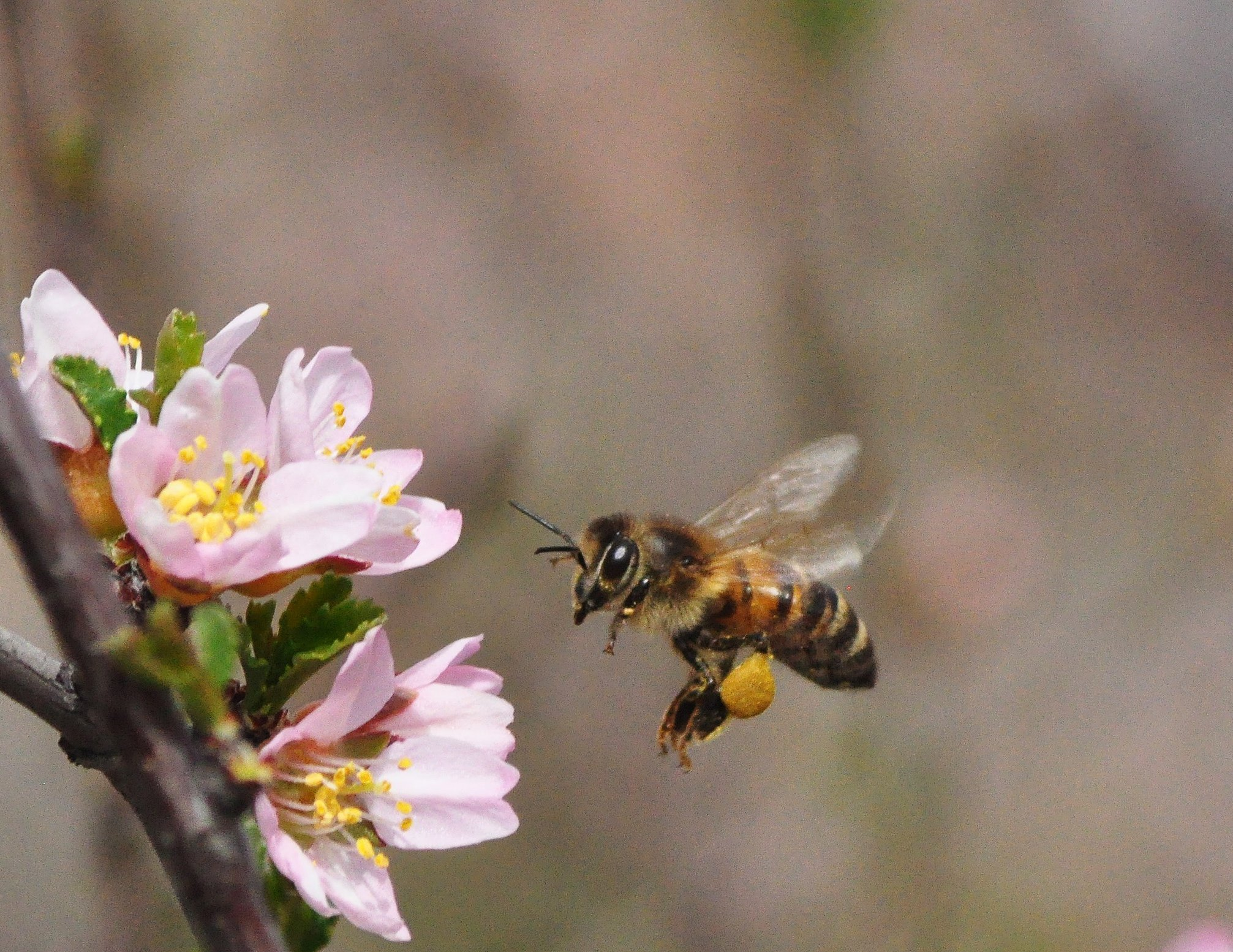 The bee collects nectar